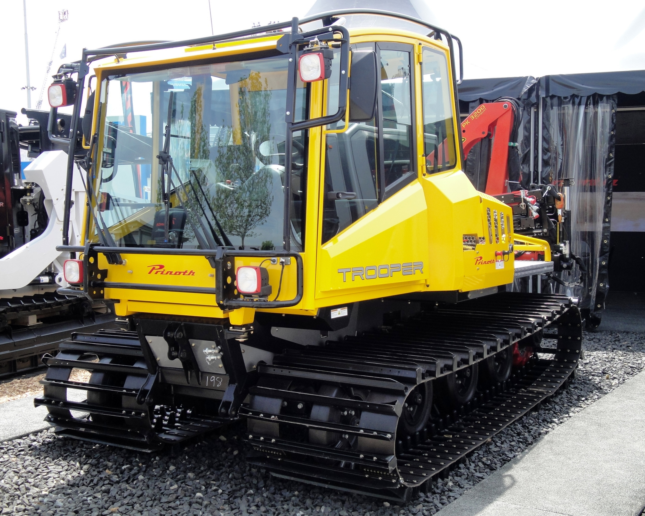 Prinoth Trooper, Interschutz 2010